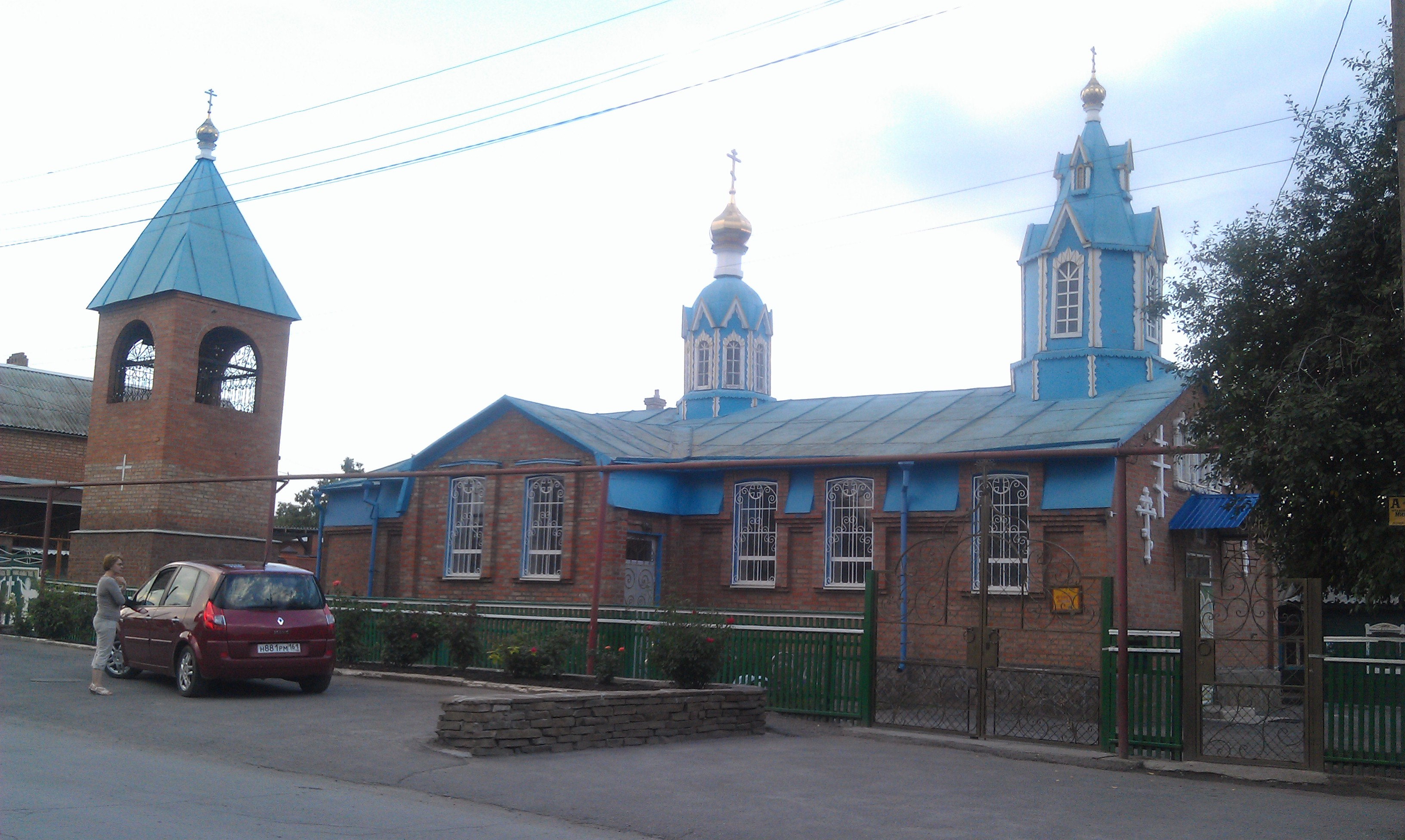 Церковь михаила архангела (Ростовская область, Шахты, р. п. каменоломни)